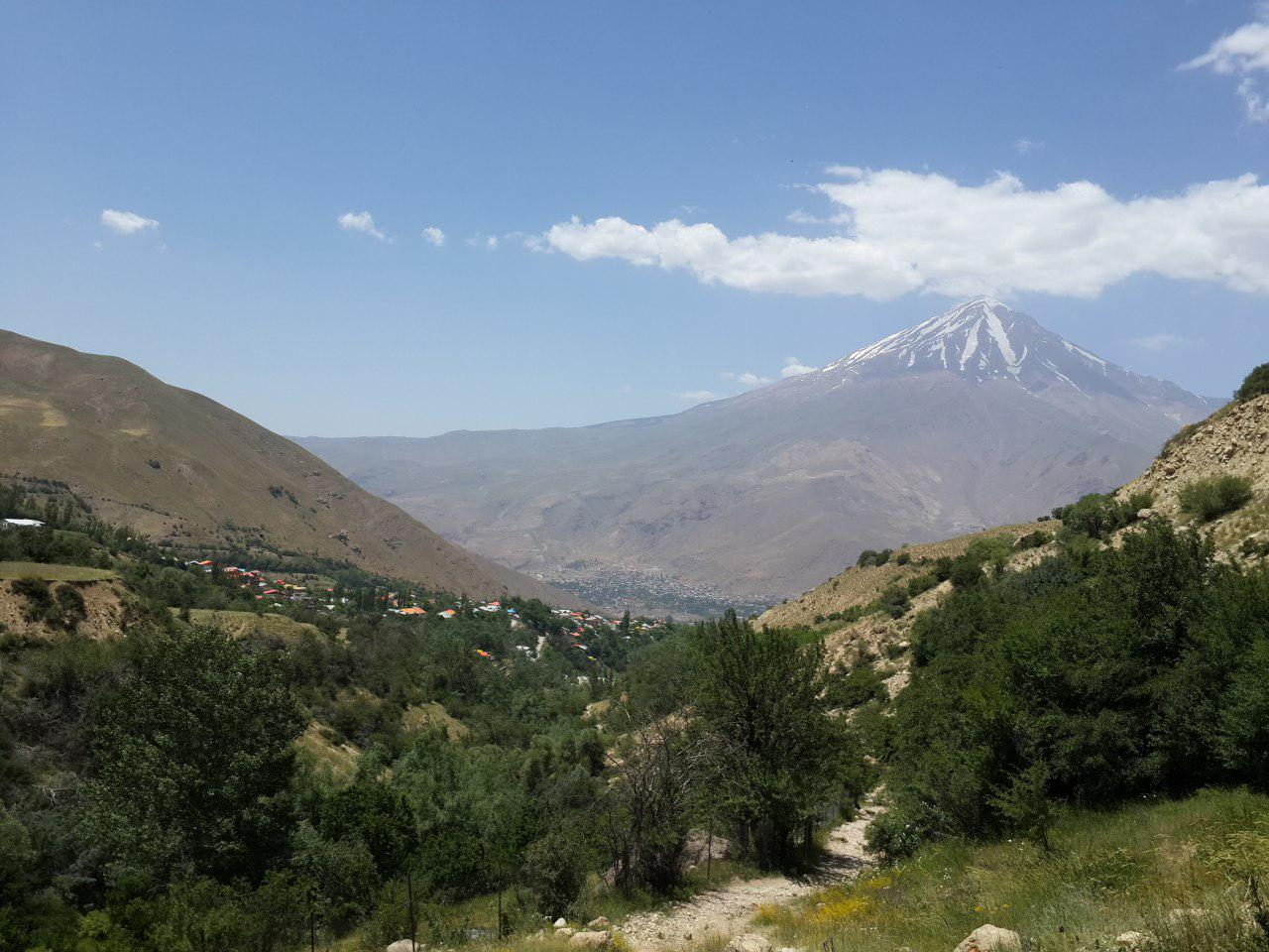 روستای نوا